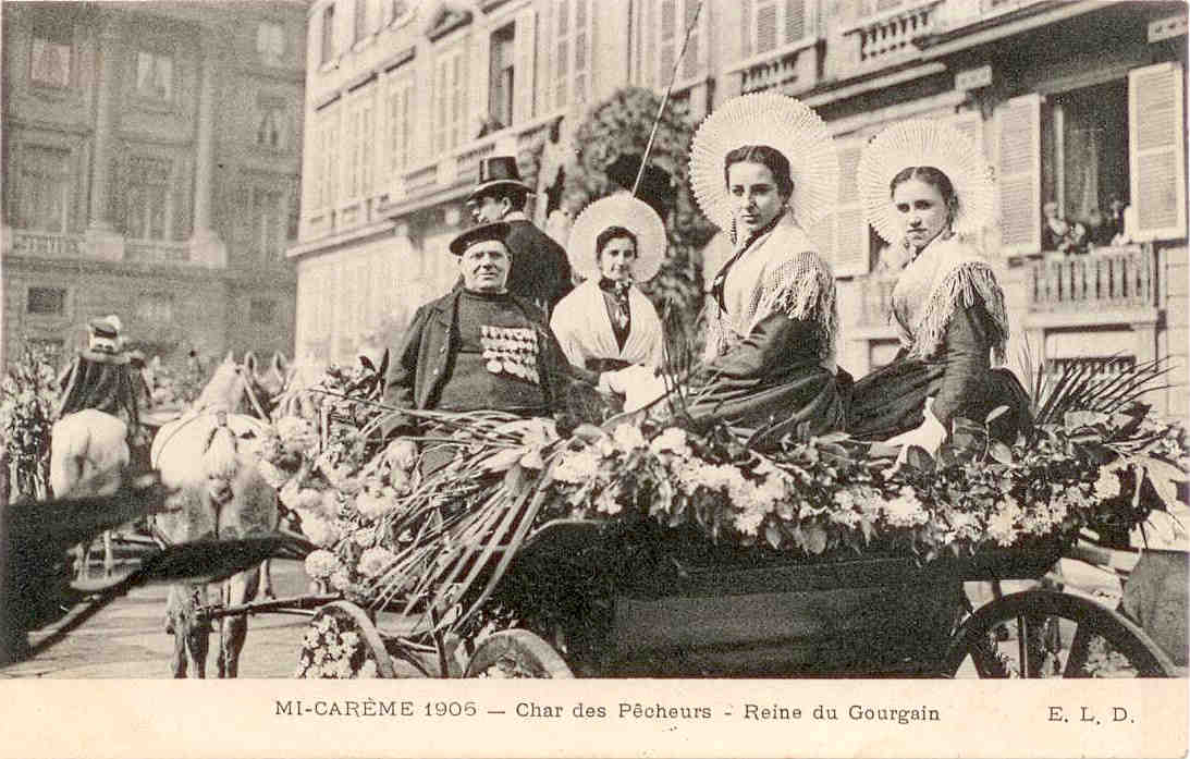 Cortège de la Mi-Carême au Carnaval de Paris 1906 : une voiture portant des délégués de Calais dont la Reine du Courgain quartier maritîme de Calais.